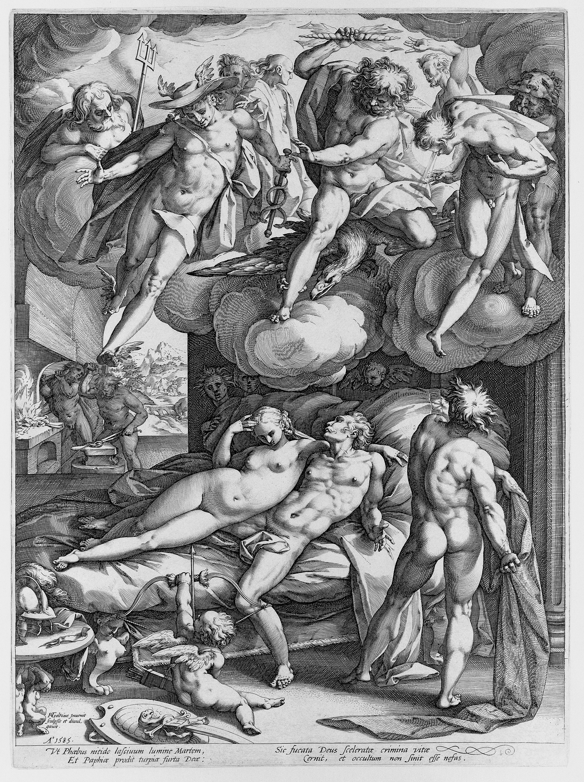 Hendrick Goltzius (Muhlbracht 1558 – Haarlem 1617) Venere e Marte nella fucina di Vulcano Bulino originale misure foglio mm 419 × 307 Il soggetto è di invenzione e si rifà al testo Omerico: Marte e Venere sono raffigurati nel momento in cui vengono sorpresi e imprigionati con la rete da Vulcano. A sinistra un’apertura oltre la quale si vede la fucina di Vulcano e sullo sfondo un paesaggio campestre. Vulcano lavora all’incudine e Apollo al suo fianco rivela l’adulterio della moglie. In alto gli Dei osservano la scena (Nettuno, Mercurio, Giove, Apollo ed Ercole). Presso il Paul Getty Museum di Los Angeles è conservato il disegno preparatorio a penna e inchiostro marrone e biacca, le dimensioni sono le medesime ma la composizione è in controparte. Nell’angolo inferiore sinistro dell’inciso si legge la data di esecuzione (A° 1585) dopo la scritta “A Goltzius Invenit/ sculpsit et divul../gavit”. La composizione è nello stile di Spranger benché la figura di Giove rimandi ad un’incisone di Caraglio derivata da Rosso Fiorentino. Esemplare nel raro I/III stato con il solo indirizzo di Goltzius ma prima di quello di Visscher (II/III). Impressione eccellente con tono di fondo, minimo margine lungo il lato inferiore altrimenti rifilato lungo la battuta. Ottimo stato di conservazione eccetto piccolo strappo restaurato lungo il lato destro. Filigrana: “lettere I G e grappolo d’uva” (Briquet, 13162 – 13194), databile al 1580 – 1590, nord della Francia e Olanda. Bibliografia: Bartsch 139; T.I.B. III, ; Hollstein, III, 137; Scheda tecnica di Matteo Crespi, Il bulino antiche stampe Milano, 2012.